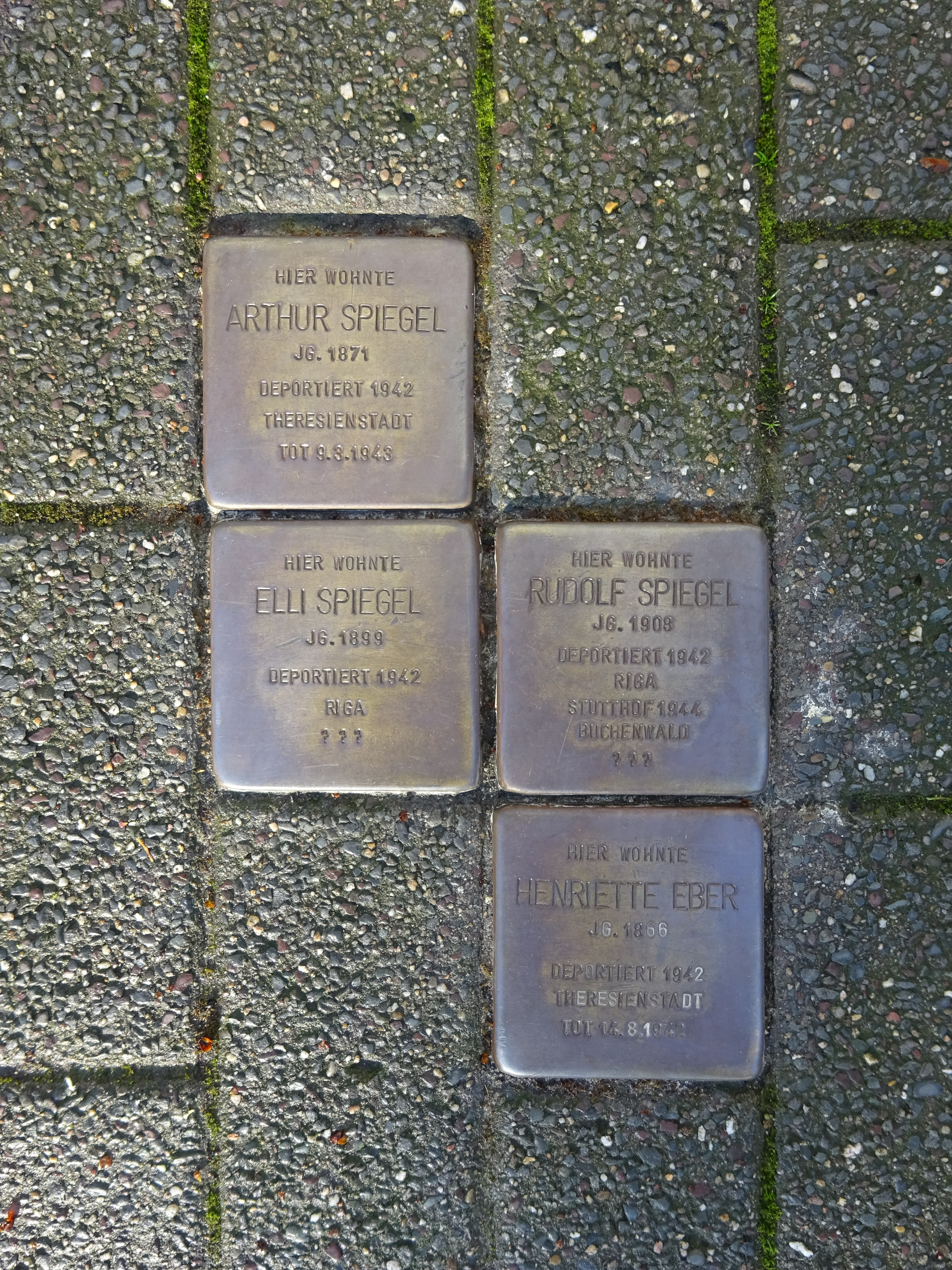 Stolpersteine für Fam. Spiegel in Dortmund, Märkische Straße 50